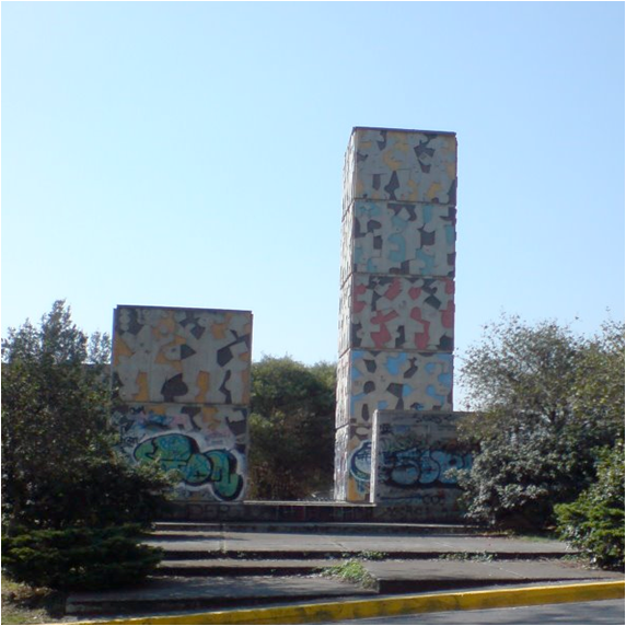 Restos (ubicados en Fuentes Brotantes) del edificio multifamiliar "Presidente Juárez", construido en la Ciudad de México (1950-1952), en Avenida Cuauhtémoc y que por el sismo de 1985 fue derrumbado.